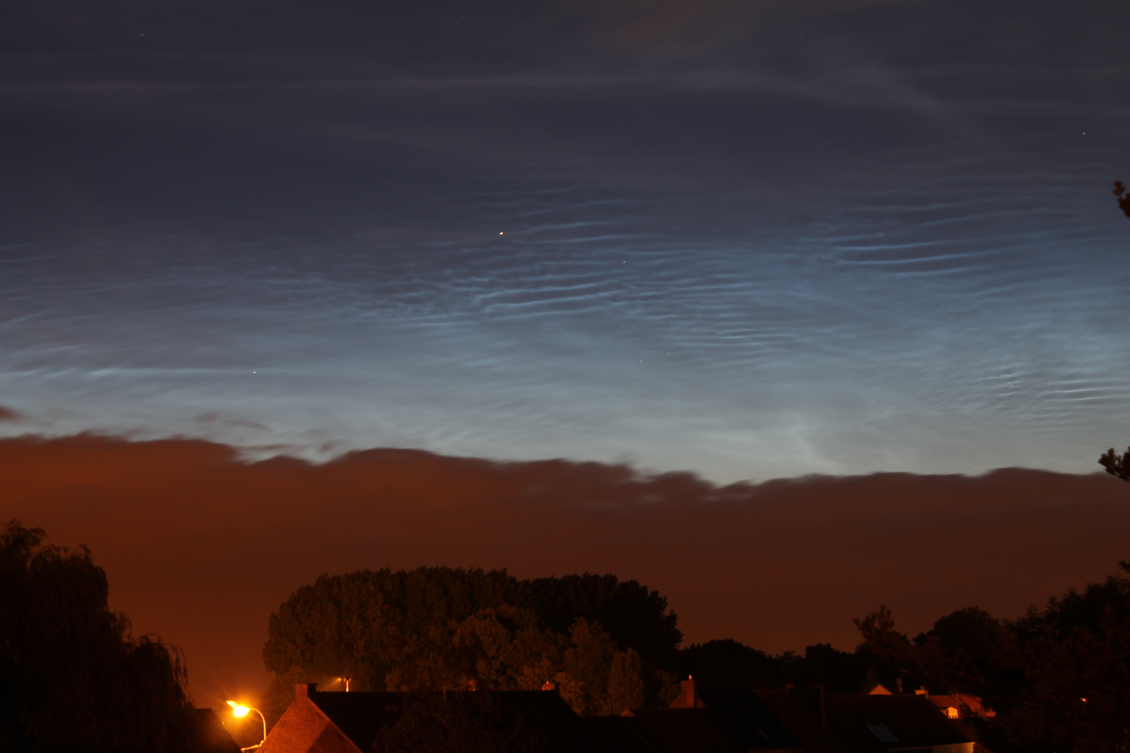 Lichtende Nachtwolken boven Dadizele (België) tijdens de ochtend van vrijdag 20 juni 2014